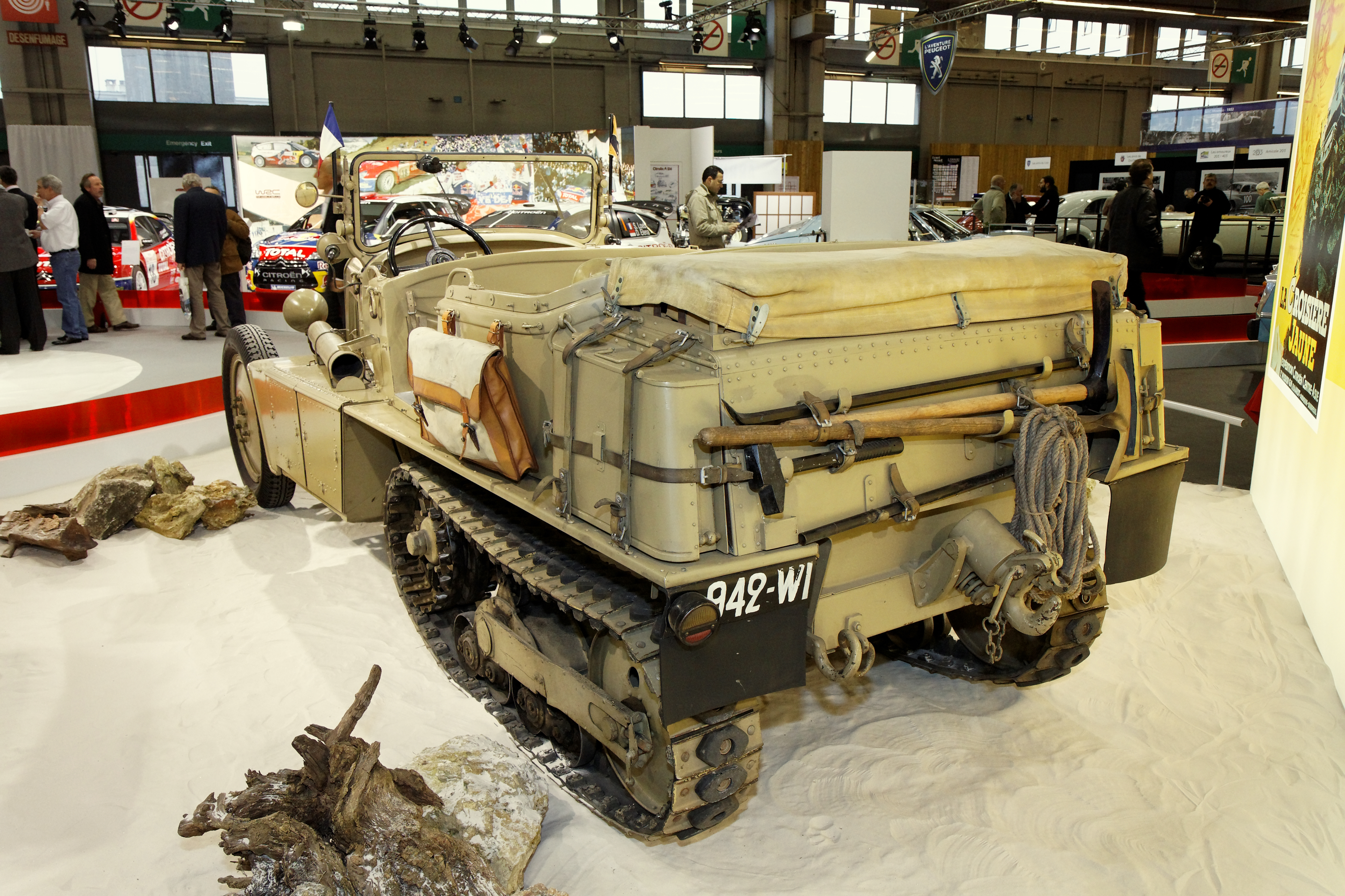 Photographie prise lors du salon rétromobile 2011 à Paris, porte de Versailles.